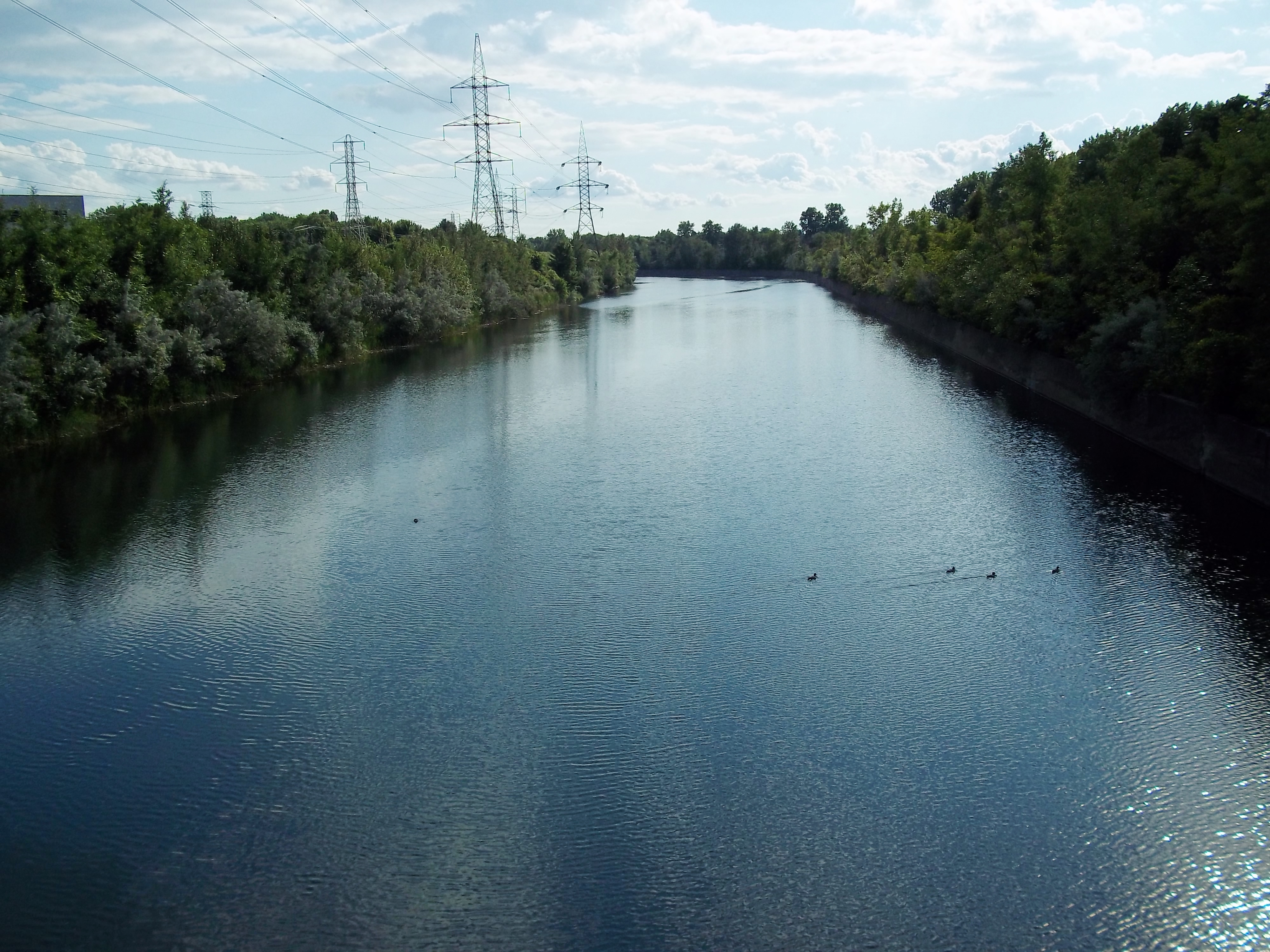 Canal de l'Aqueduc, LaSalle, Montréal